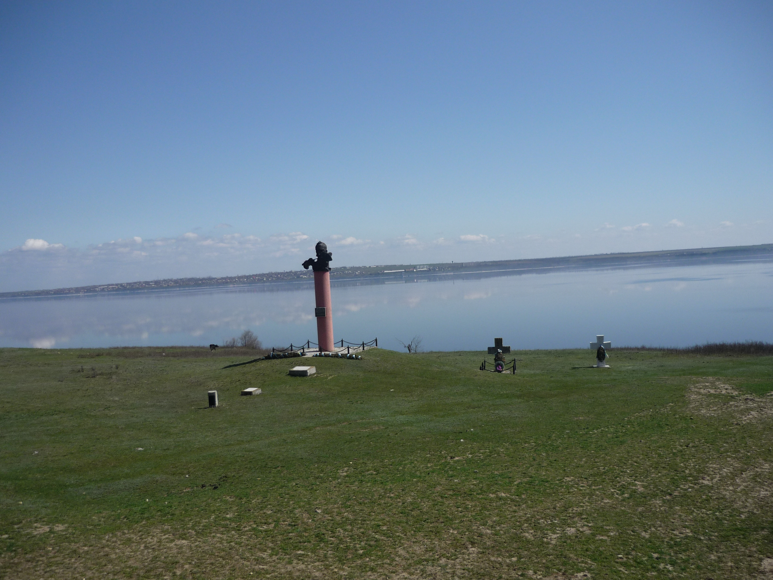 Каменская Сечь. Могила атамана Каменской Сечи Костя Гордиенко. Современный обелиск Костю Гордиенко.